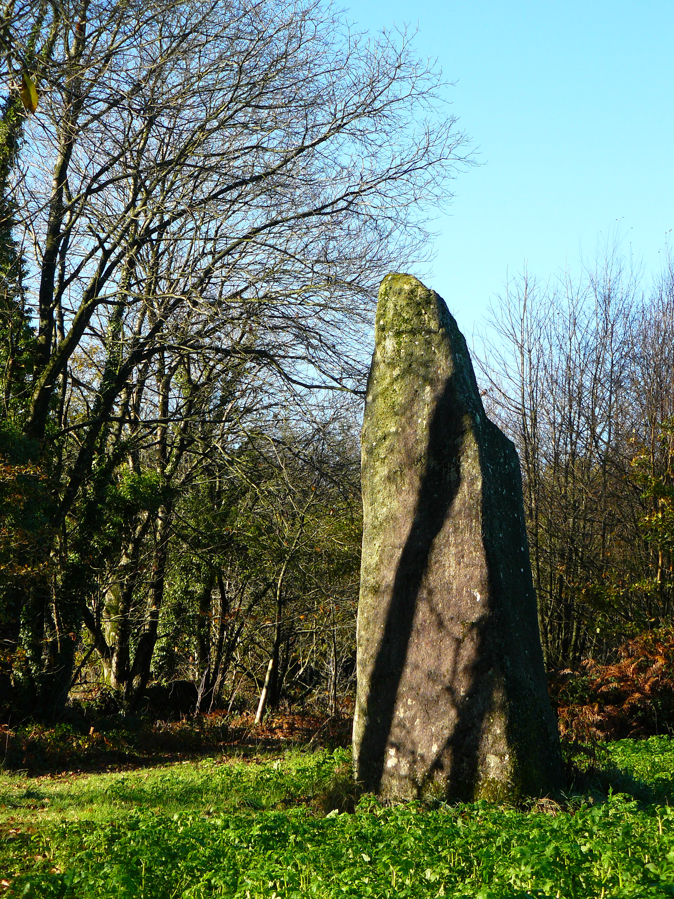 Menhir de Goh-Menhir situé sur la commune de Saint Jean Brévelay 56 FRANCE